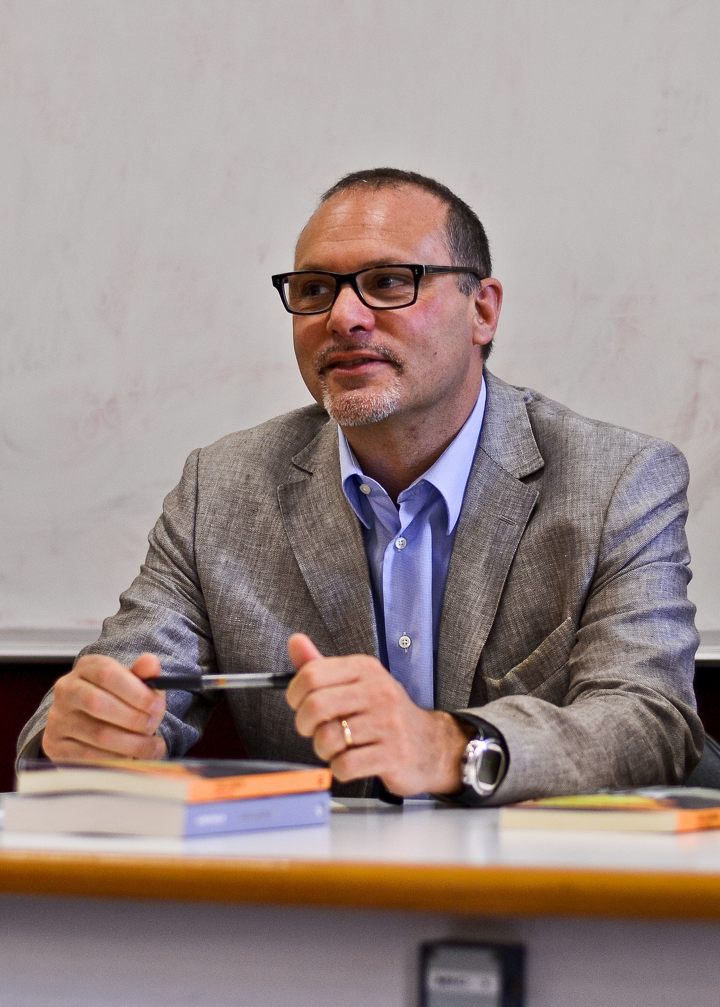 Alfredo Macchi. Sapienza Università di Roma